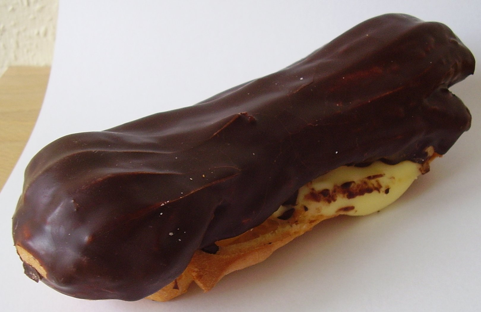 Eclaire; Liebesknochen